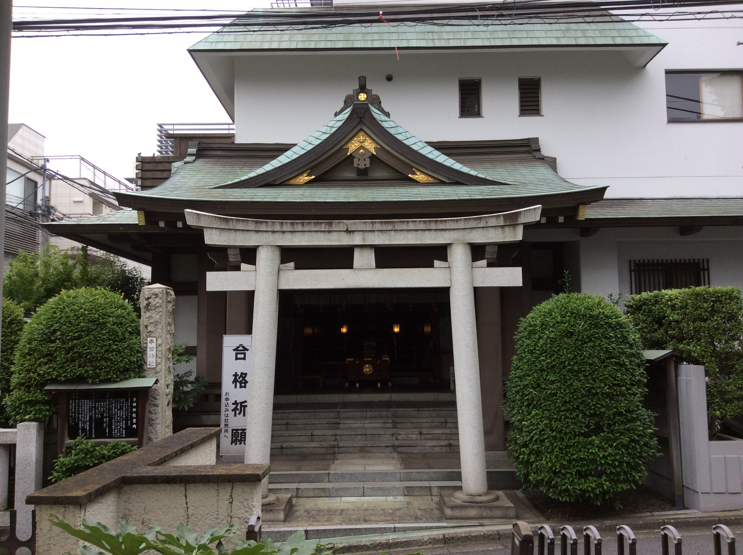 平田神社の外観